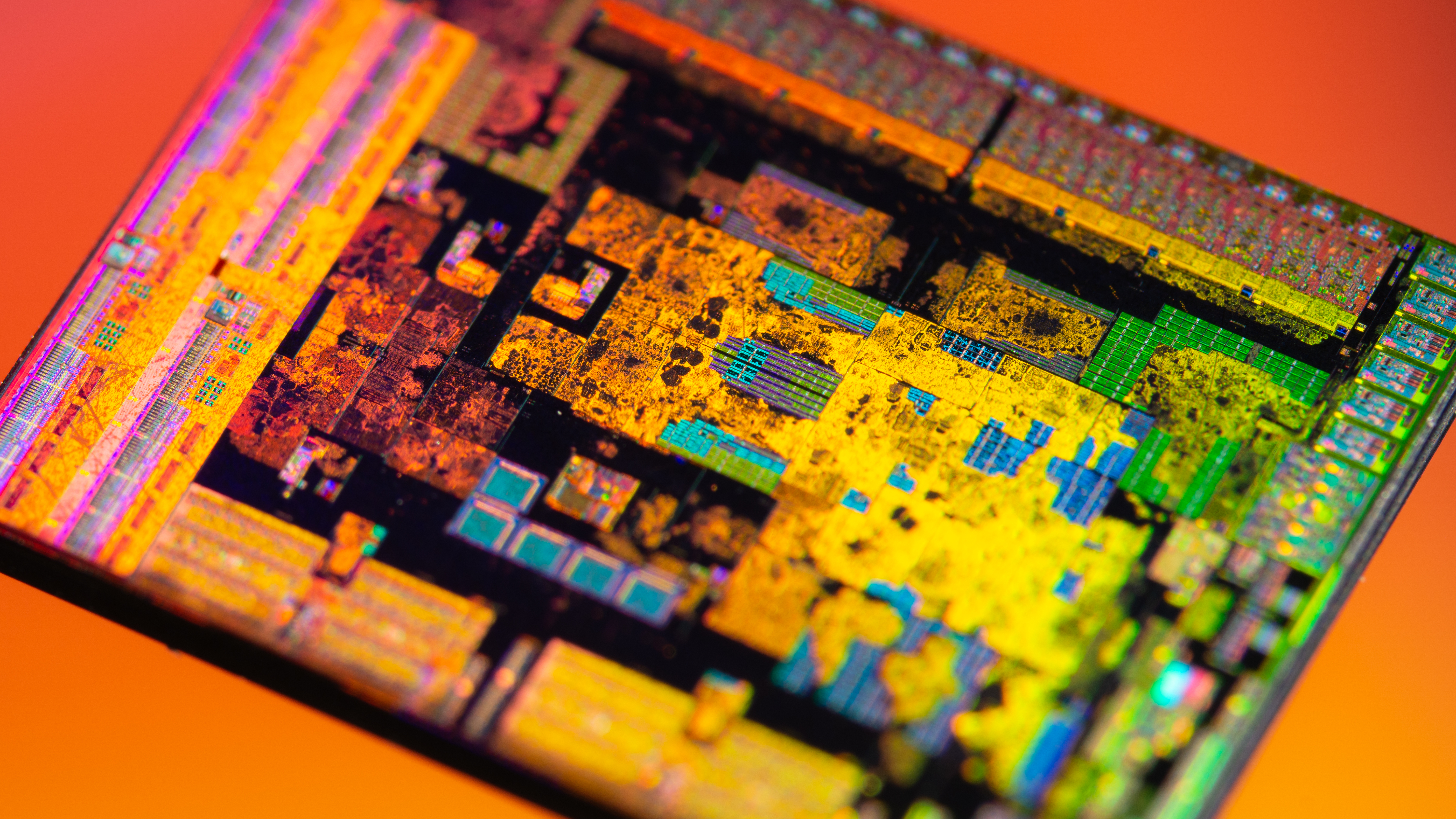 AMD Ryzen 5 3600 (Zen 2 | Matisse | IOD)